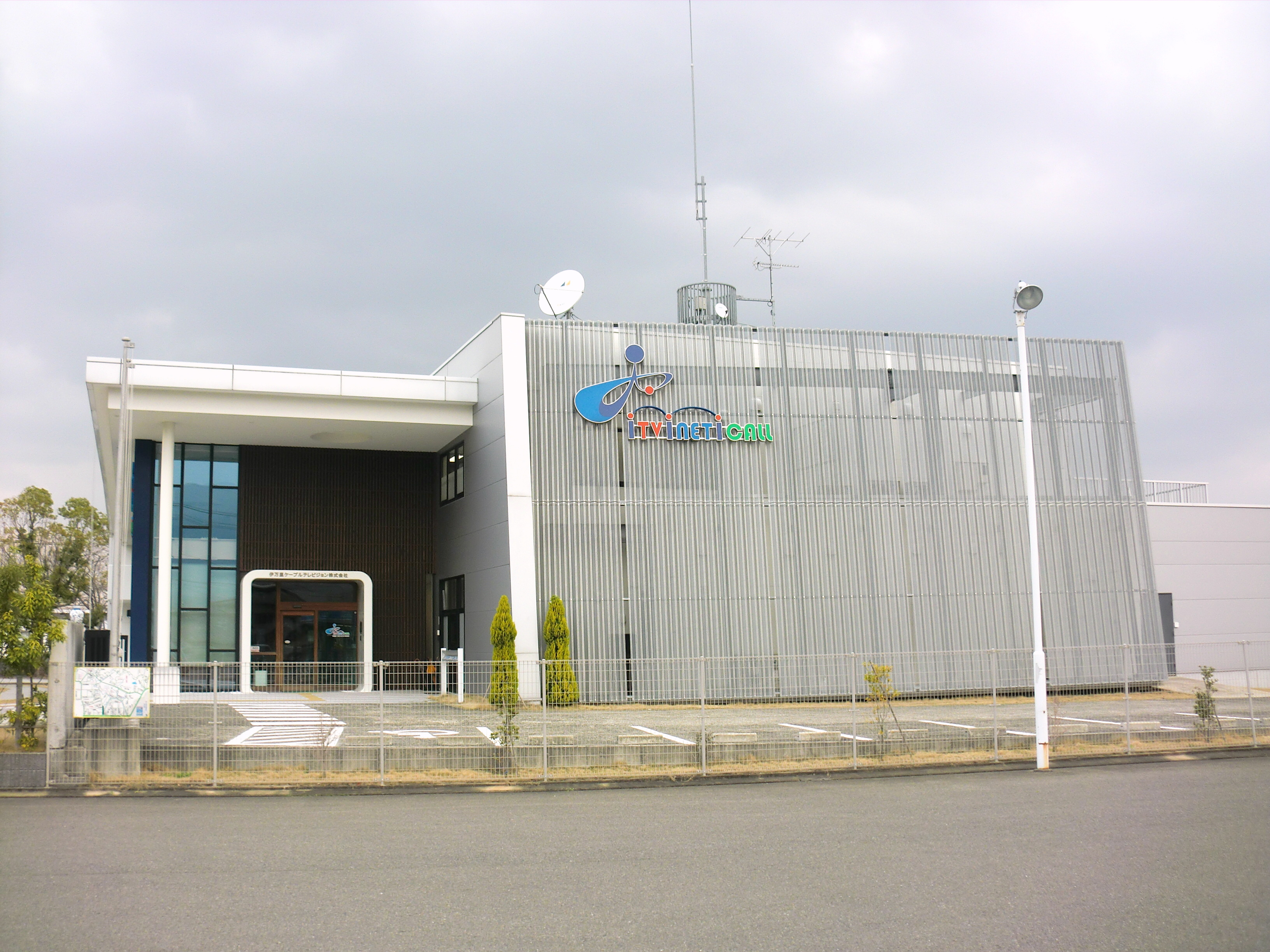 佐賀県伊万里市にある伊万里ケーブルテレビジョン